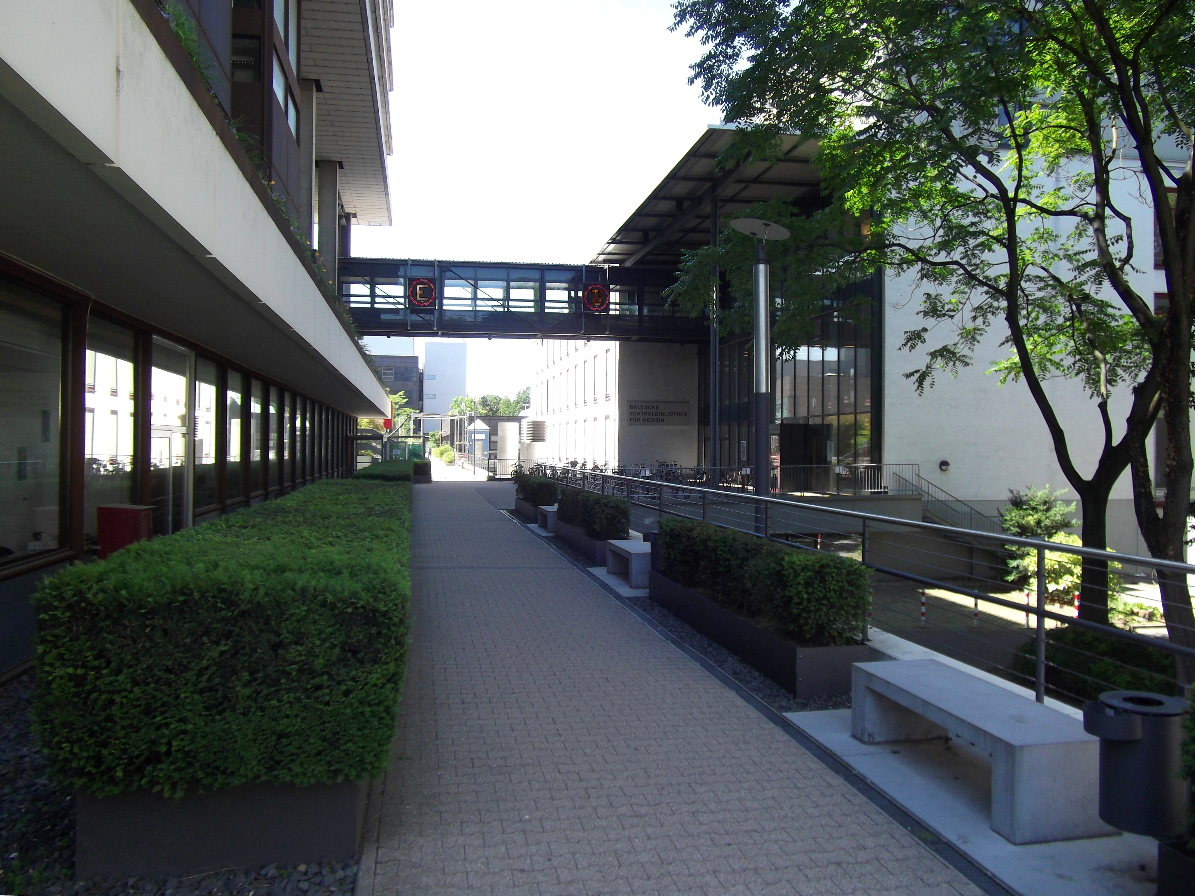 Deutsche Zentralbibliothek für Medizin, Köln